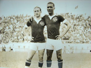 Itália, zagueiro, e Fausto, meia, destaques do Vasco em São Januário.